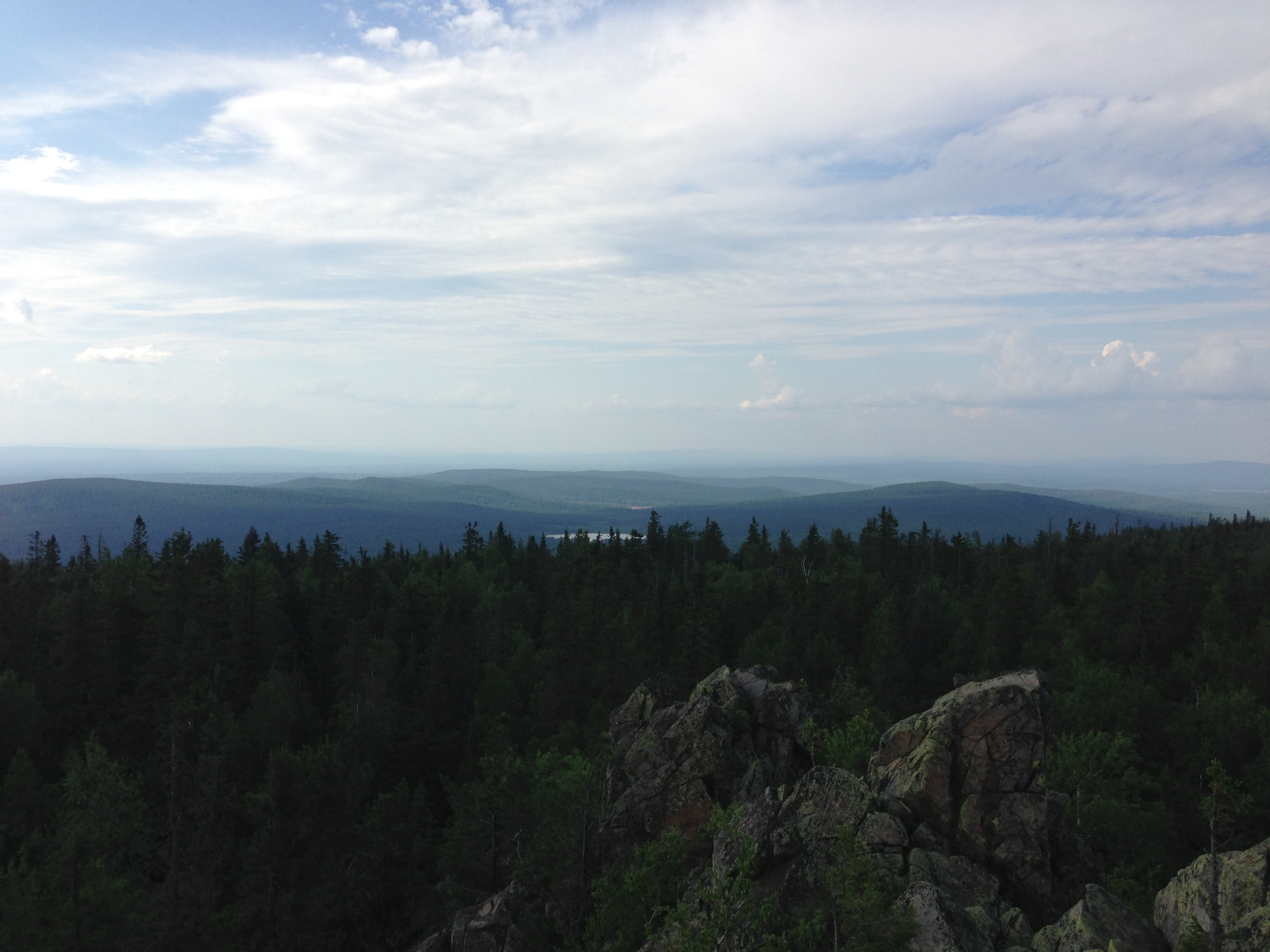 Белая гора с покрывающими её лесами, Нижний Тагил. This image is related to the protected area of Russia number 6610454